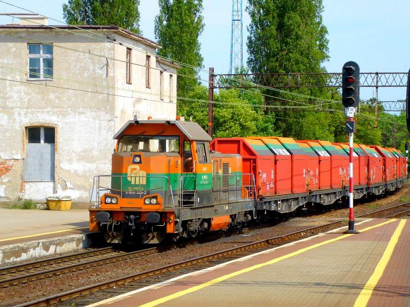 Zmodernizowany spalinowóz 6Dg-143 należący do przedsiębiorstwa Pol-Miedź Trans przejeżdża przez stację Głogów.